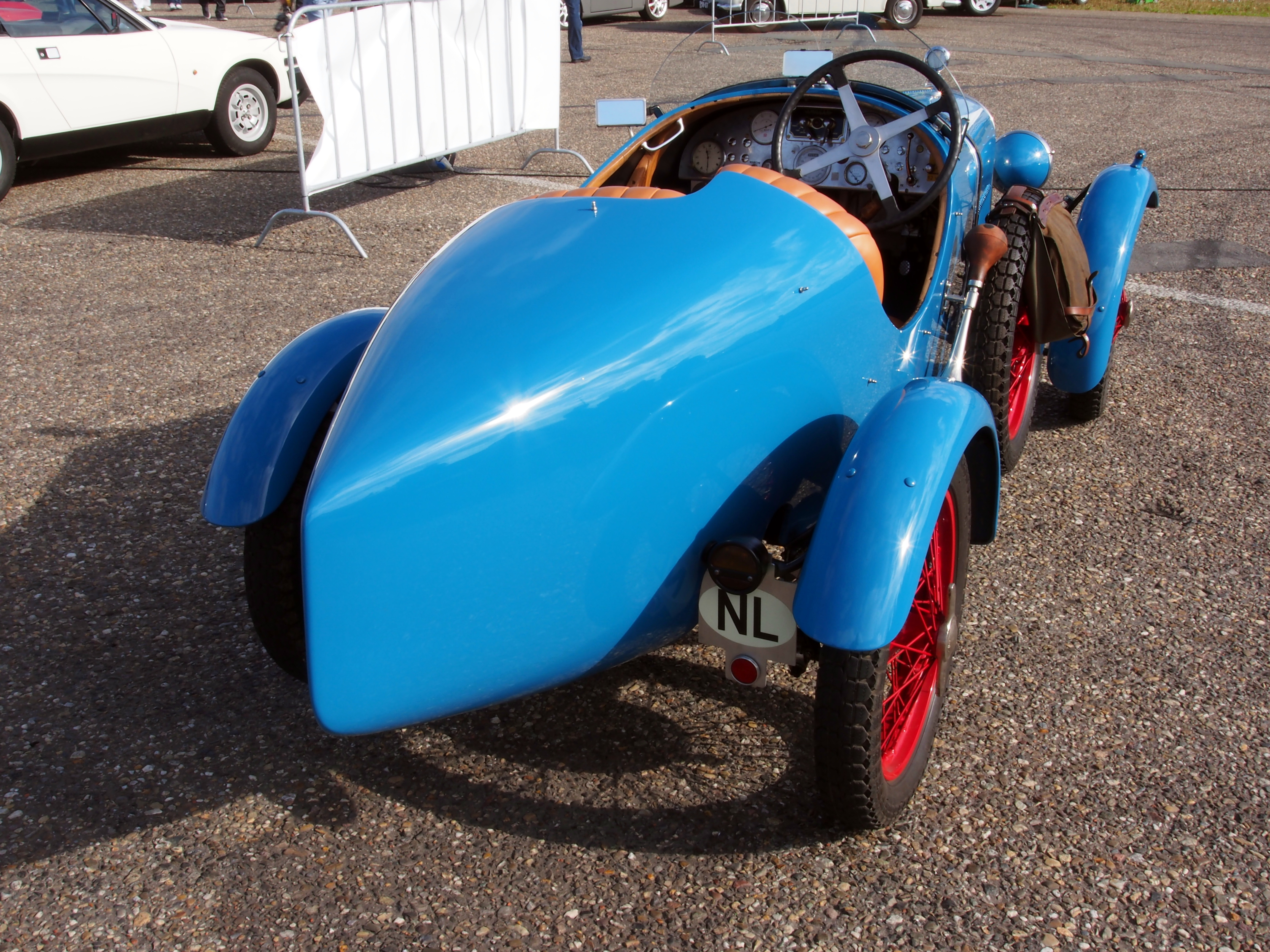 Blue 1927 Amilcar CGSS